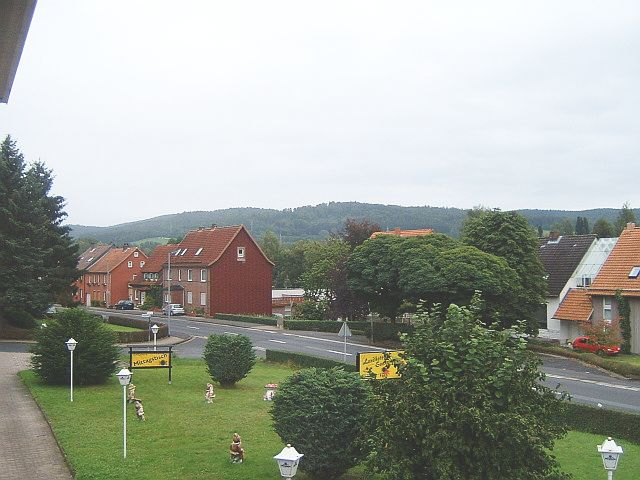 Bollensen, ein Ort zu Uslar gehörend. Ortseingang auf der B241 von Uslar kommend.